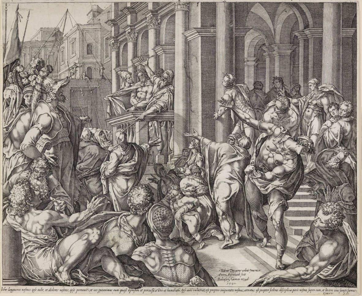 Pilatus zeigt Christus dem Volk